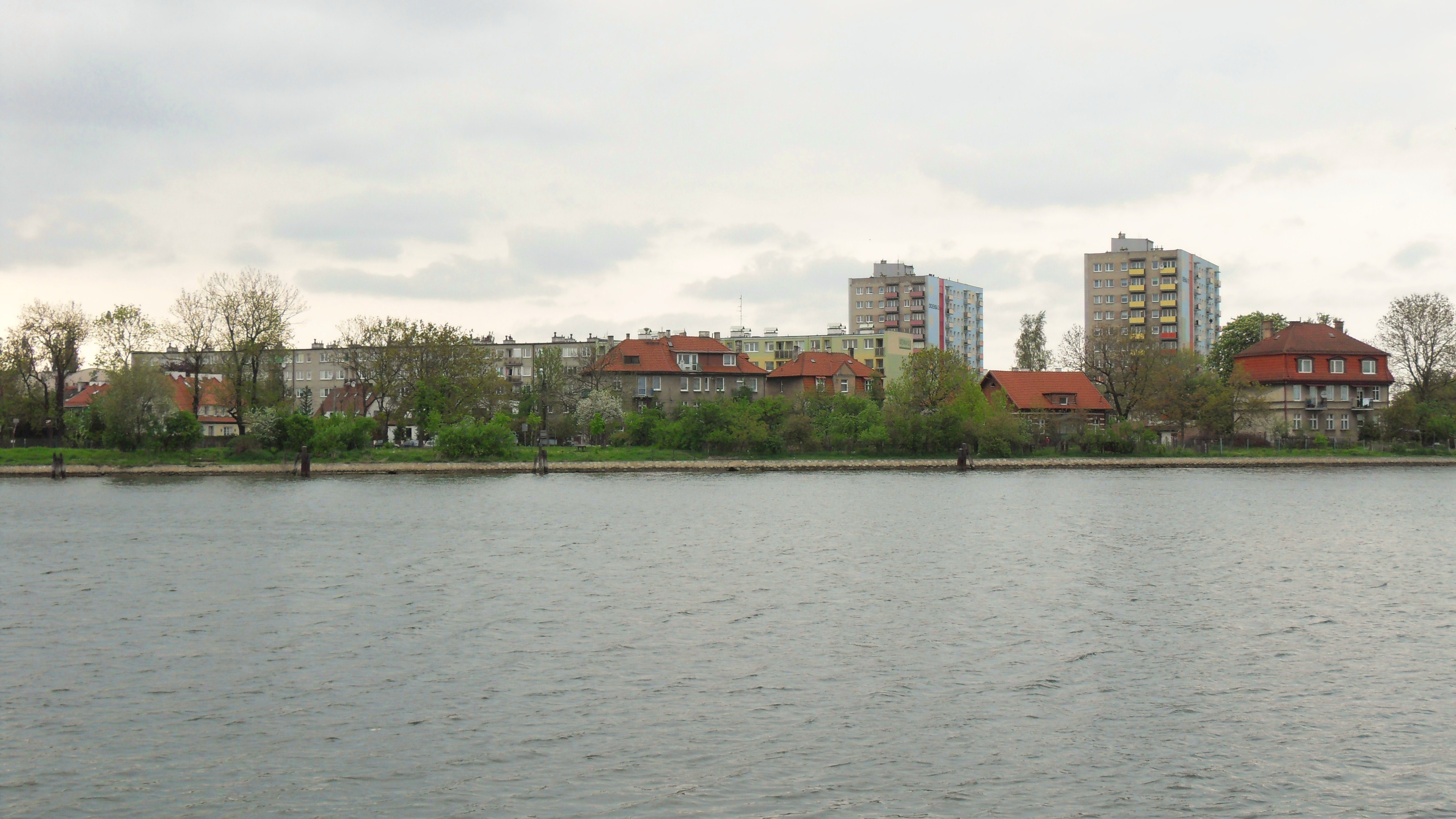 Gdańsk Przeróbka i Martwa Wisła.